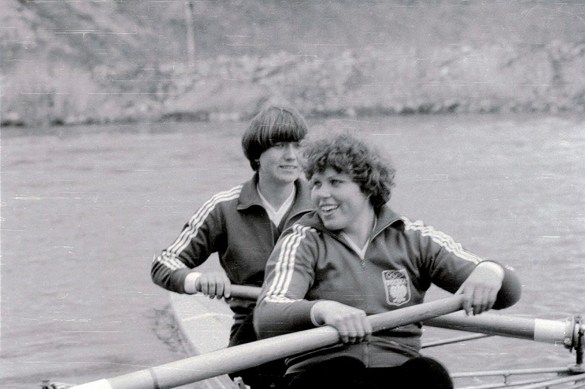 Dwójka bez sternika Gedanii Gdańsk (Czesława Kościańska, Małgorzata Dłużewska) - długi dystans, Warszawa kwiecień'82